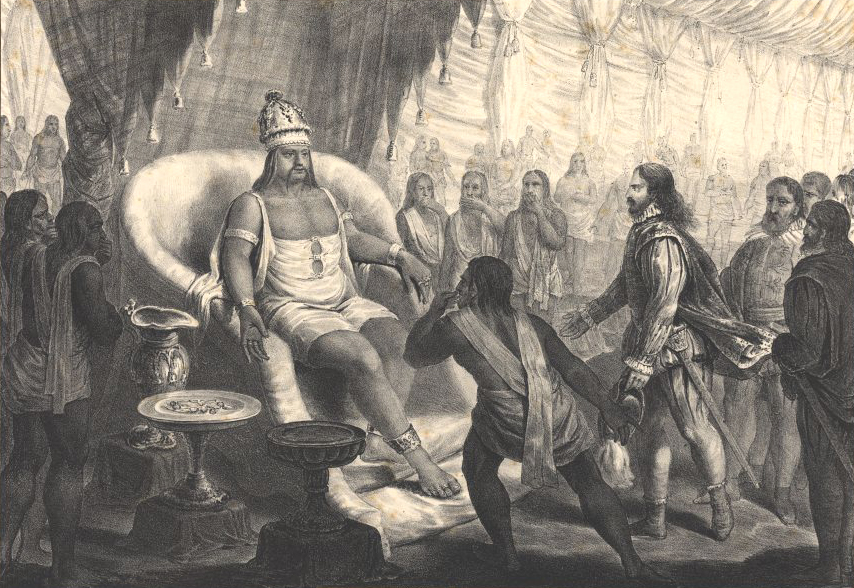 Vasco da Gama dá a sua embaixada ao Samorim em Calicute.